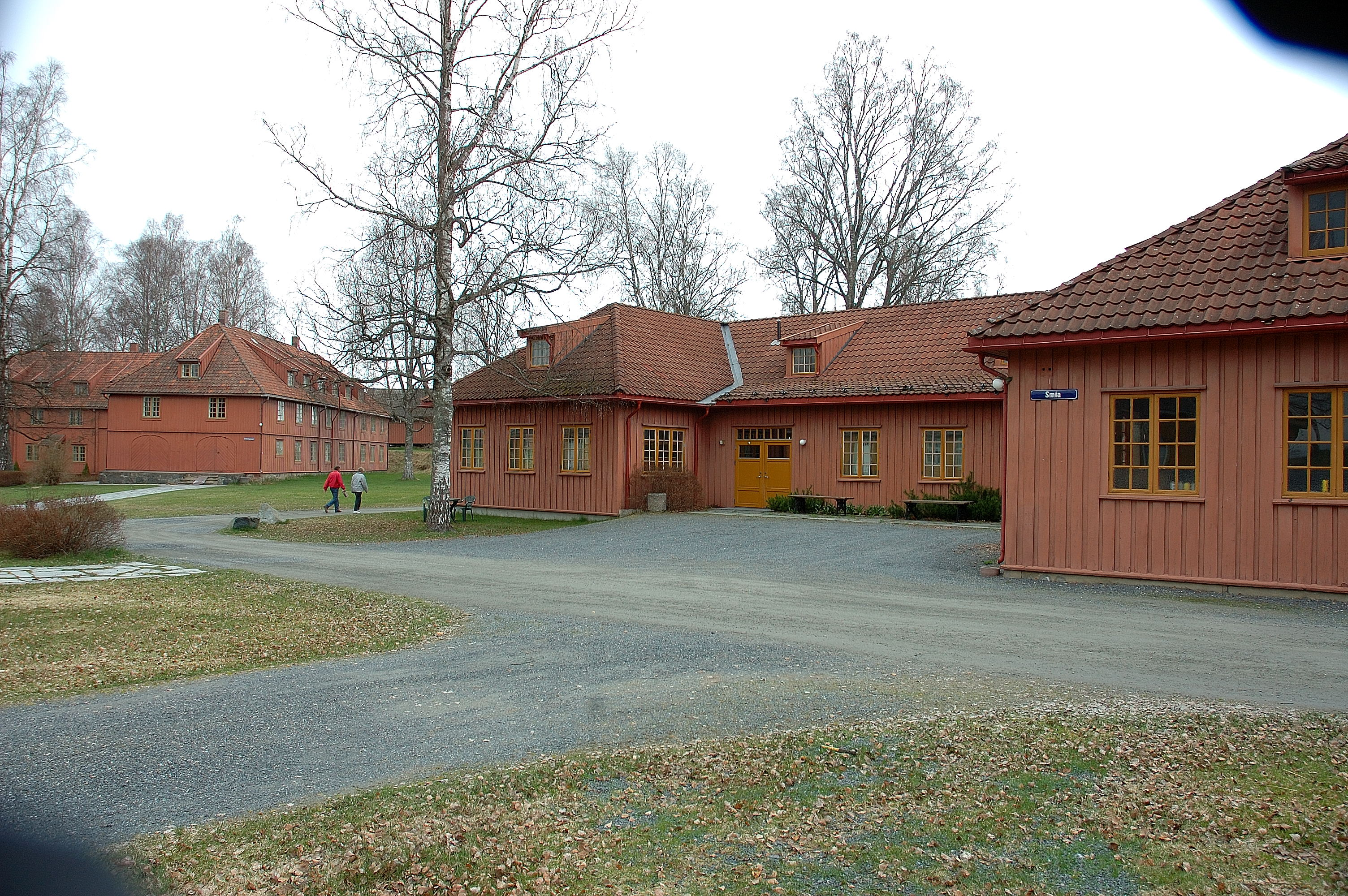 Blaker Fortress, Akershus, Norway Blaker Skanse, Akerhus, Norge